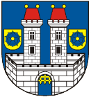 Znak města Kamenice nad Lipou